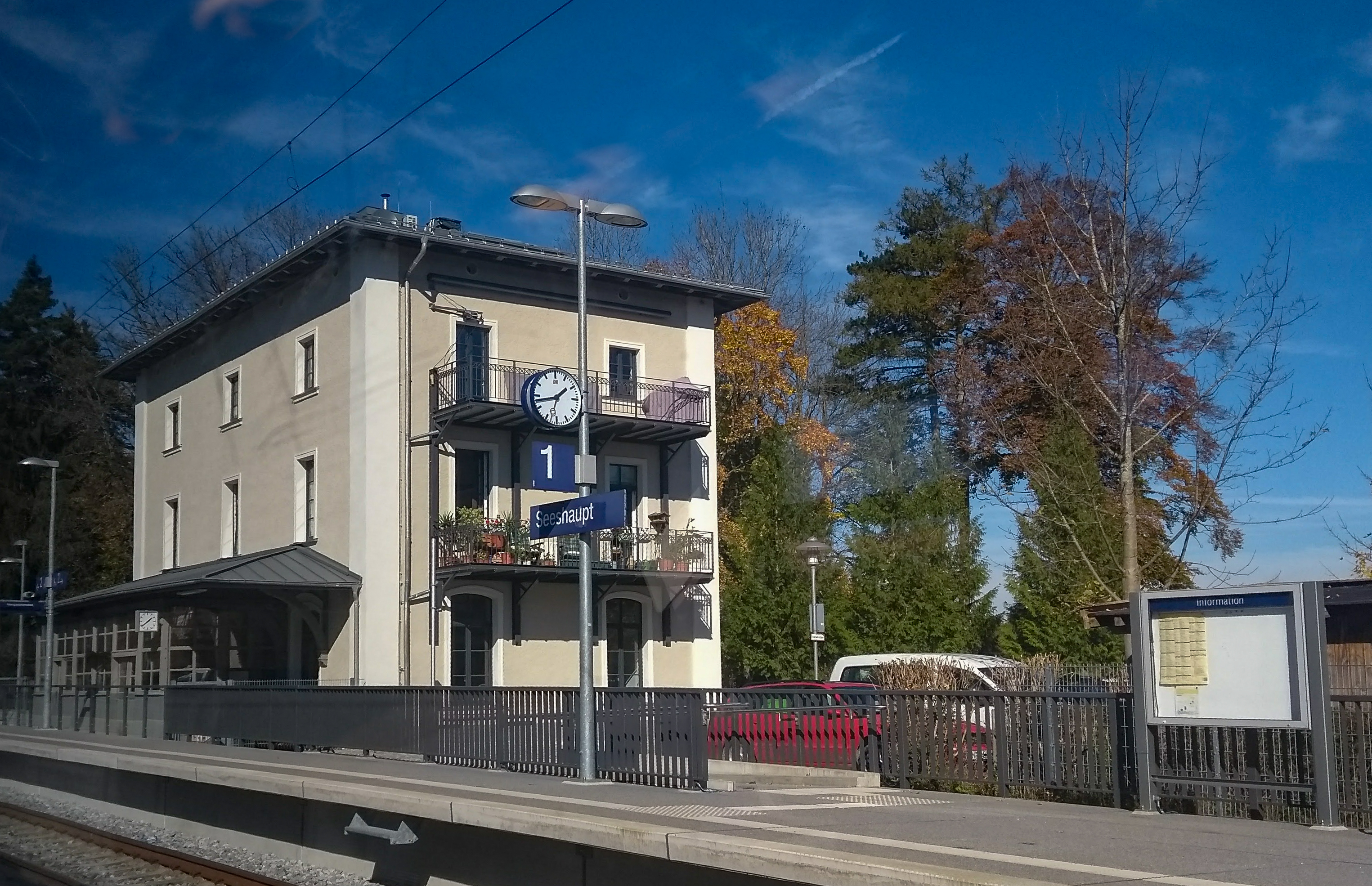 Bahnhof Seeshaupt von einem Zug auf Gleis 2 aus.